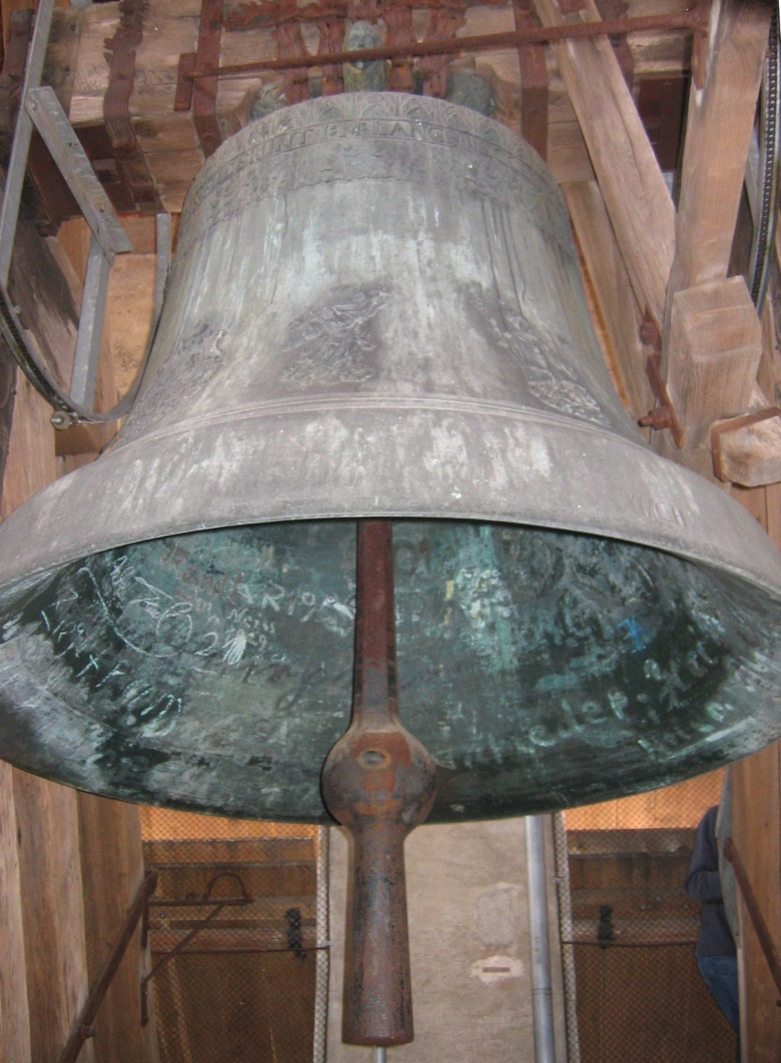 Die große Korbiniansglocke des Freisinger Domes.